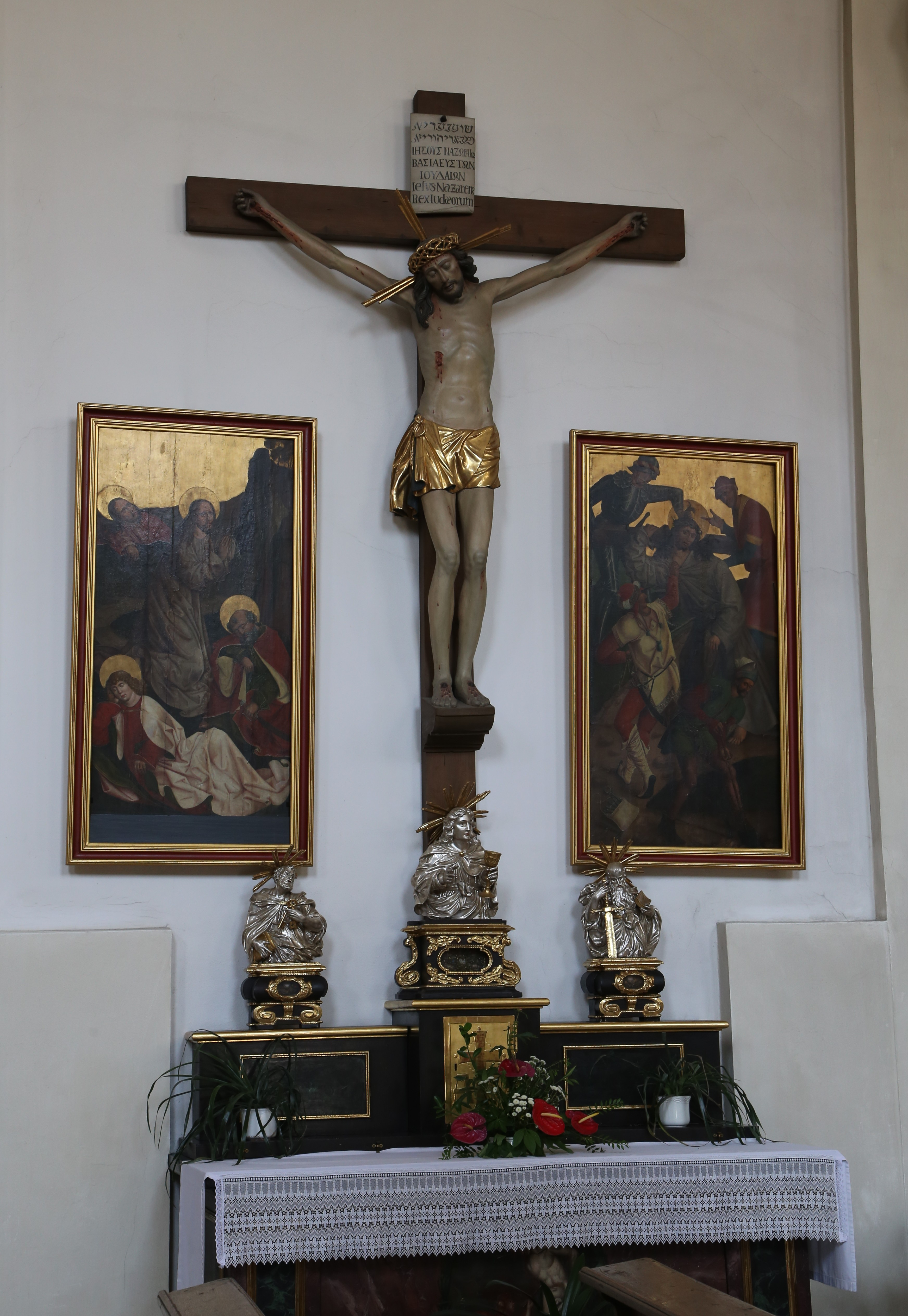 Krauterermarkt 5; Katholische Stiftskirche St. Johann, Saalbau mit eingezogenem Chor und nördlichem Chorflankenturm, Giebelfassade und Werksteingliederungen, im Kern von 1380/81, Langhaus 1766/69 weitgehend erneuert, Wiederaufbau nach Brand 1887; mit Ausstattung